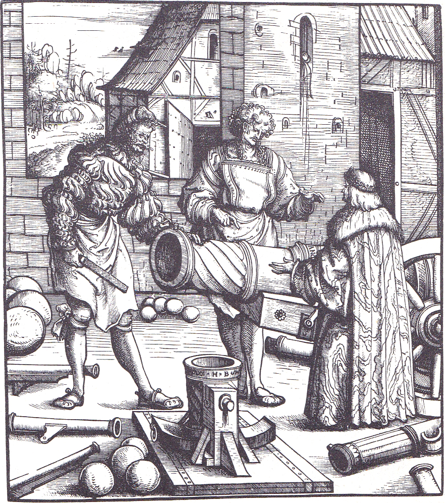 Emperor Maximilian inspects the work of weapon smiths.